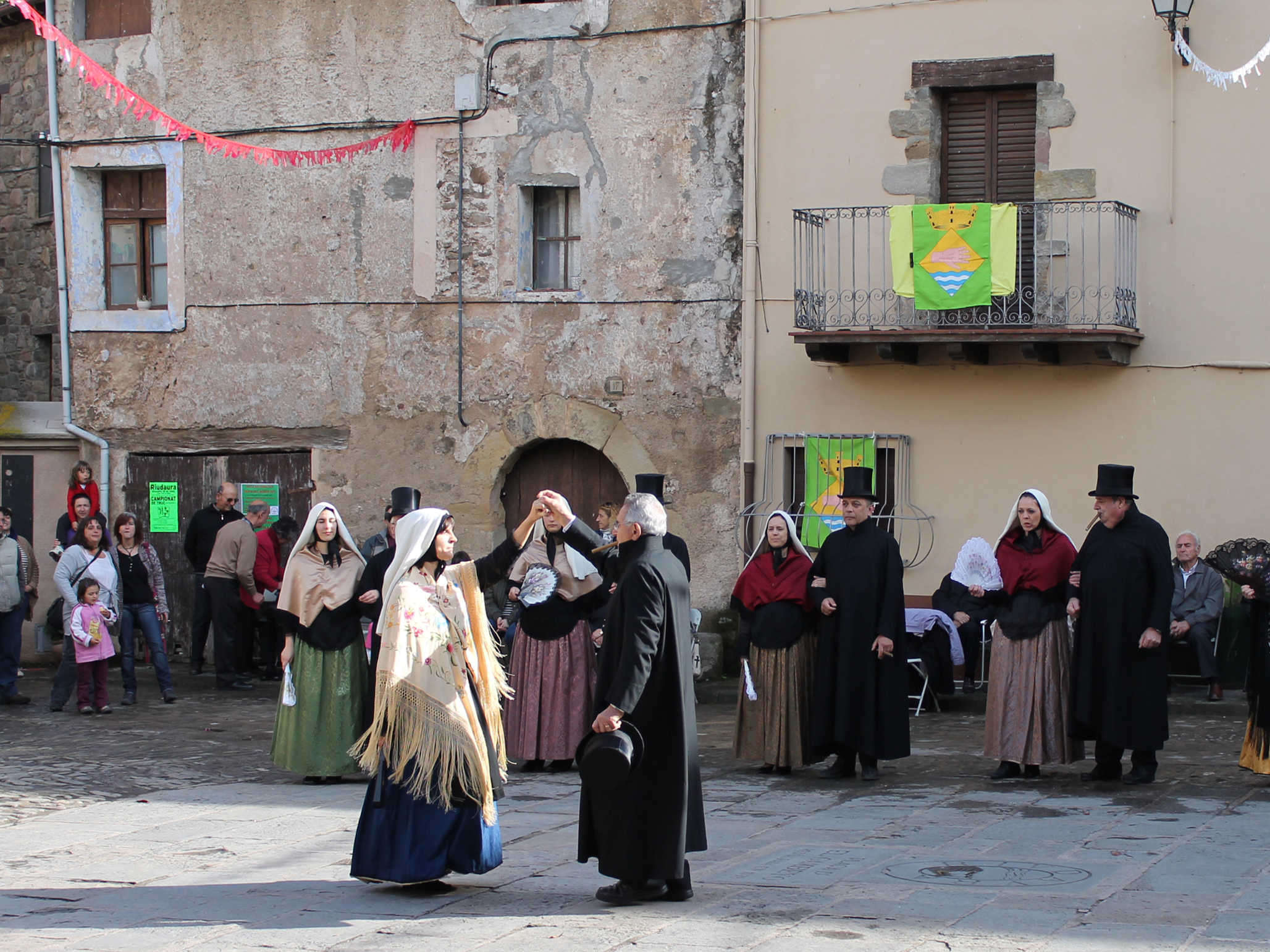 Ball del Gambeto 2013